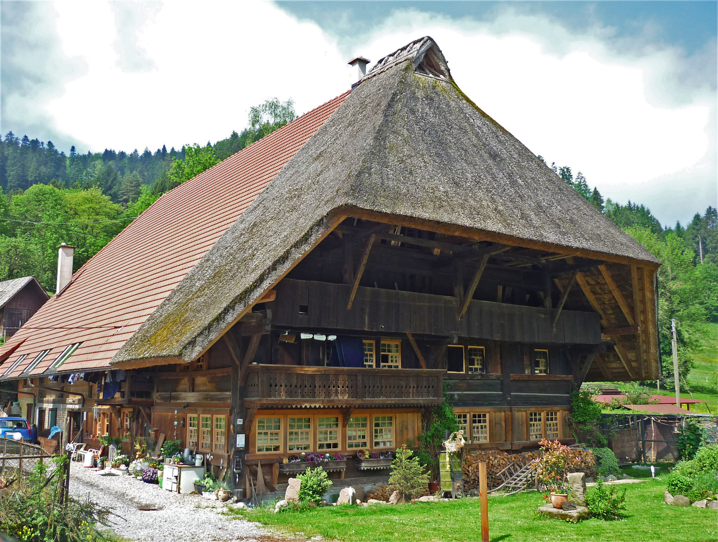 Schwarzwaldhaus in Gutach an der Schwarzwaldbahn im Ortenaukreis (Baden)